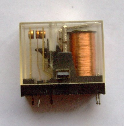 Electronic component - relay